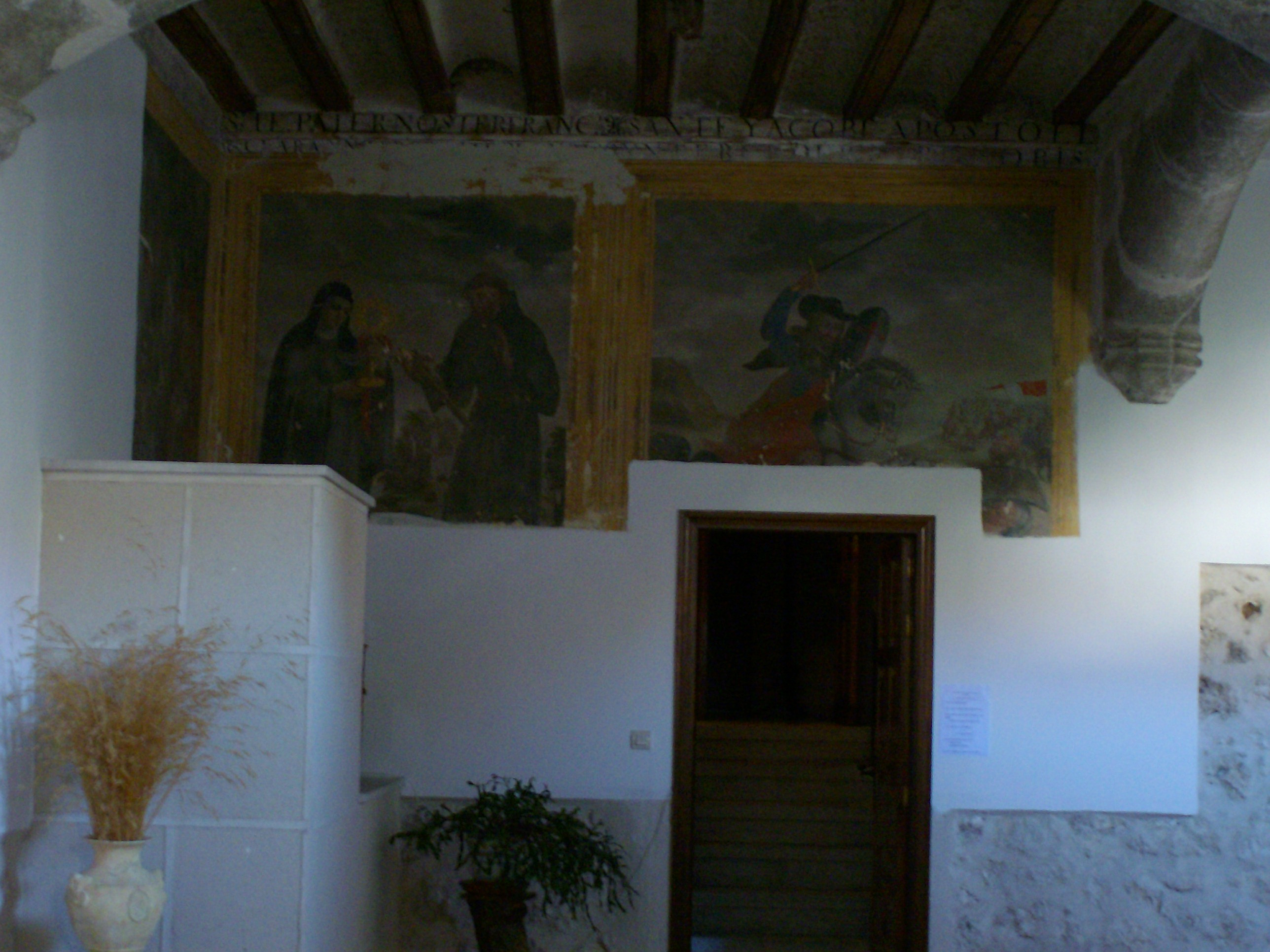 Detalle de la pintura mural en el claustro del monasterio de Santa Clara (Cuéllar)